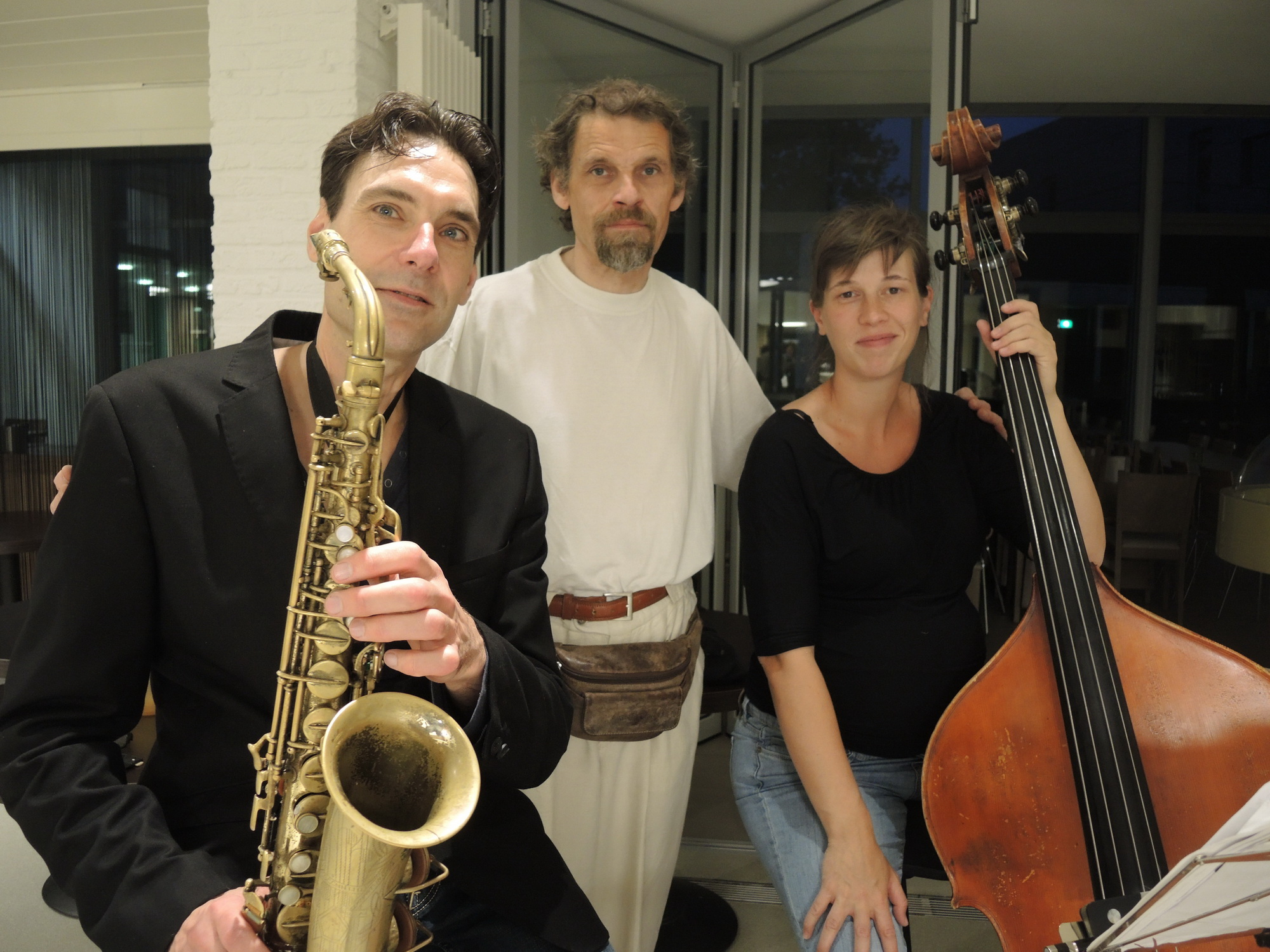 Chris Joris (midden) tijdens een Jazz optreden in Elewijt Center.